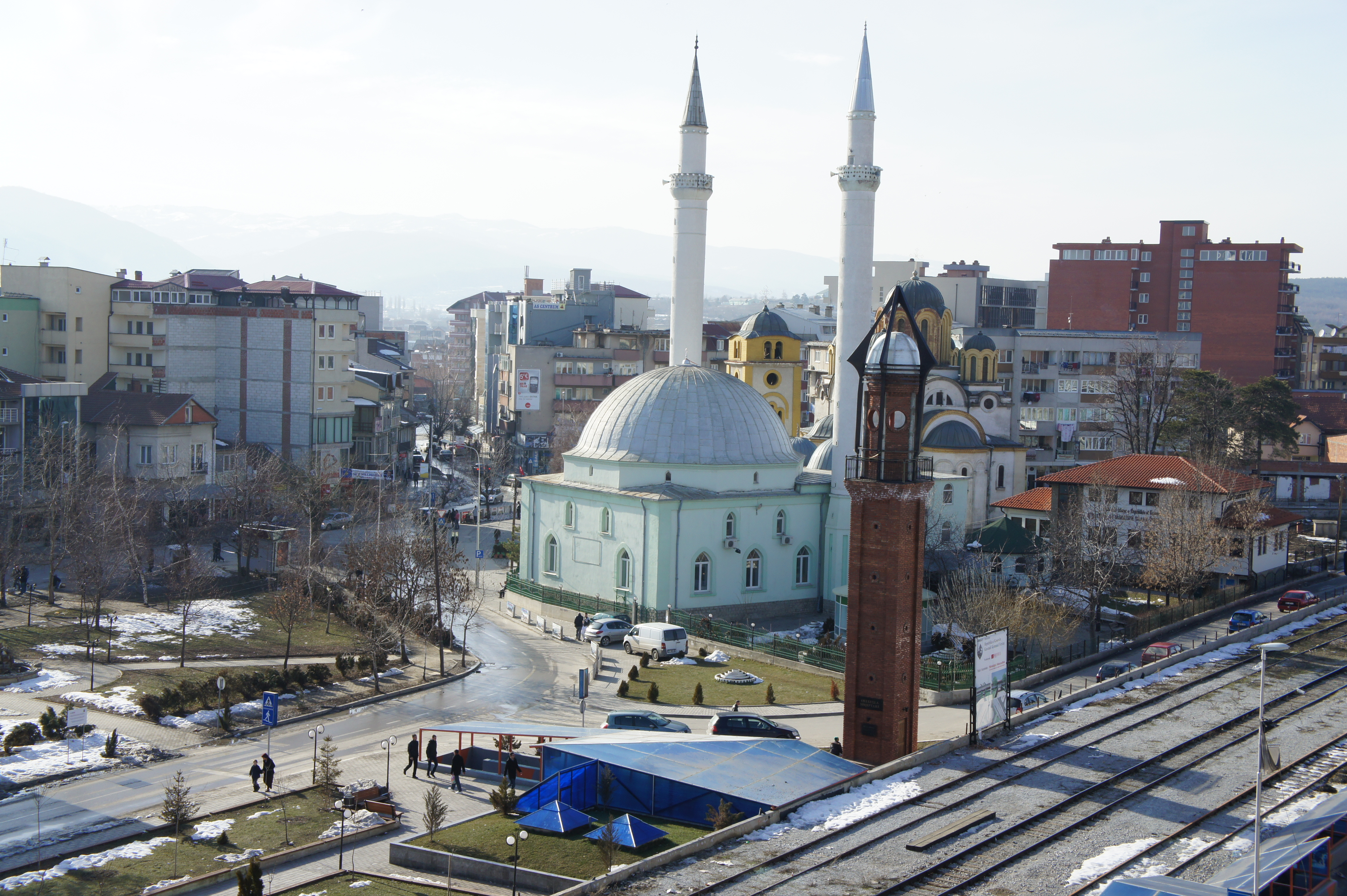 Objektet fetare te cilat e bejme te njohur qytetin e Ferizajt!